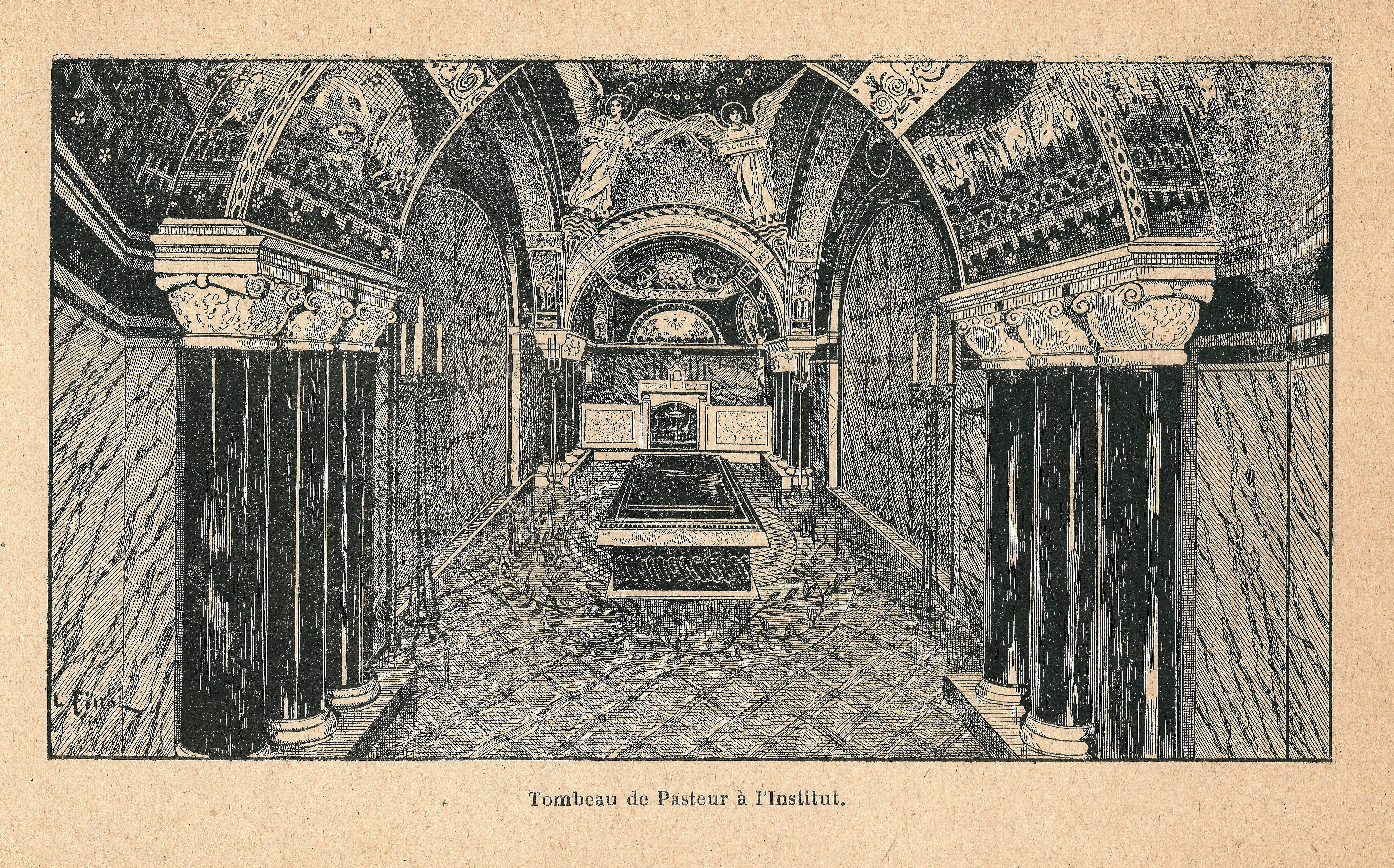 L'institut Pasteur de Paris & ses annexes : dessins vers 1900.